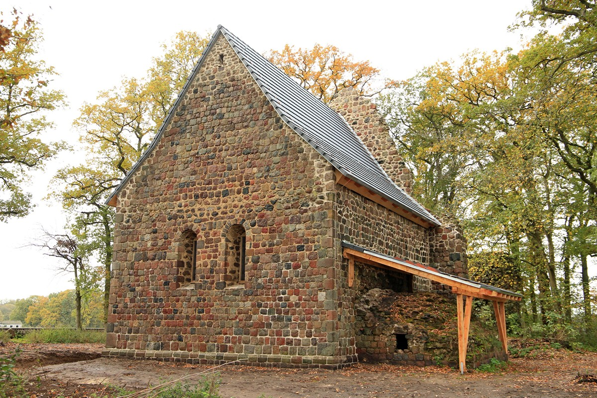 Ostgiebel der restaurierten Kirche in Dambeck (Bütow)